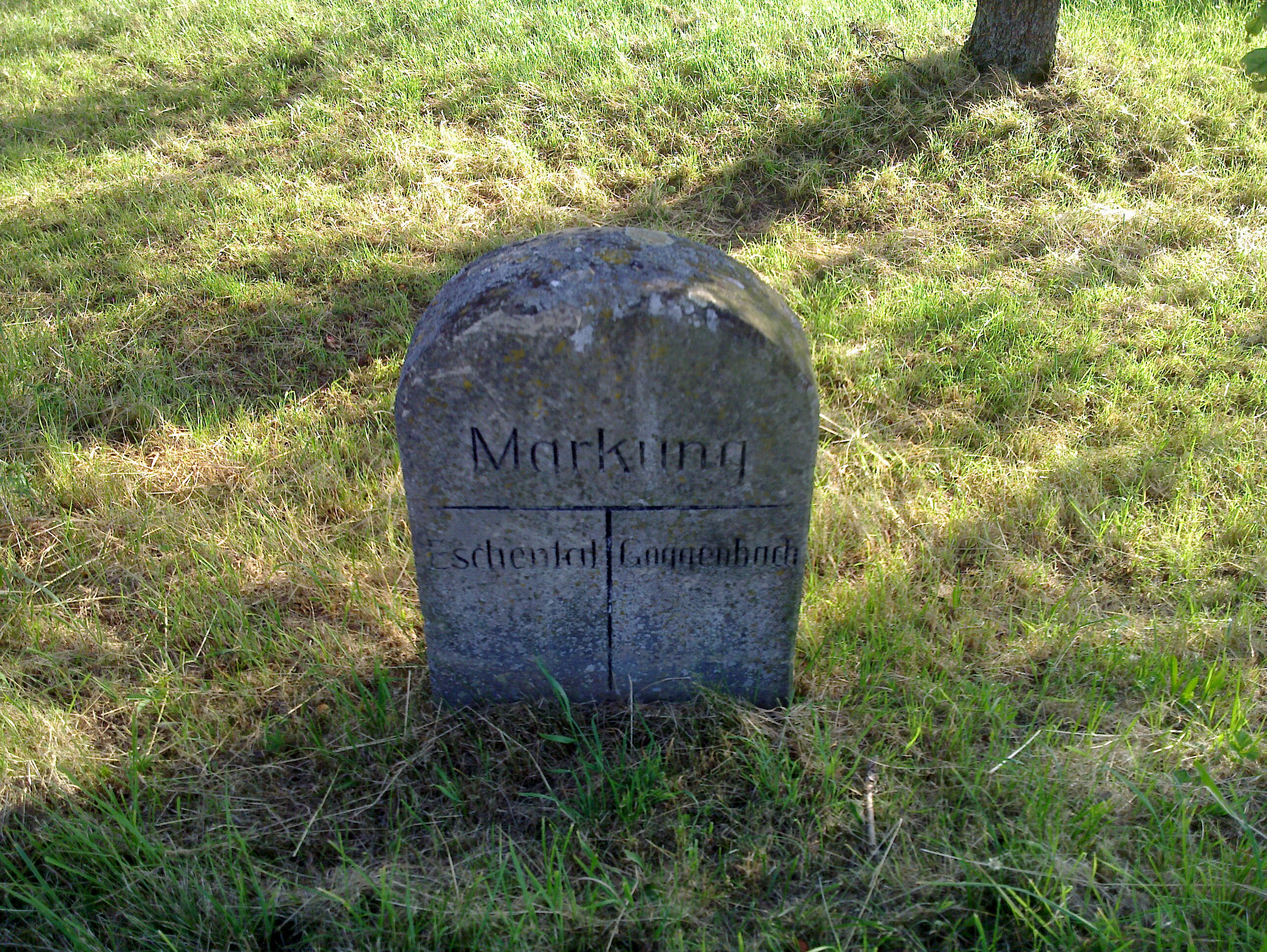 Markungsgrenze Eschental-Goggenbach